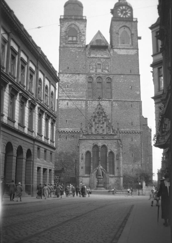 Johanniskirche Motiv: Magdeburg Kategori: (01) Exteriörer Johanniskirche.